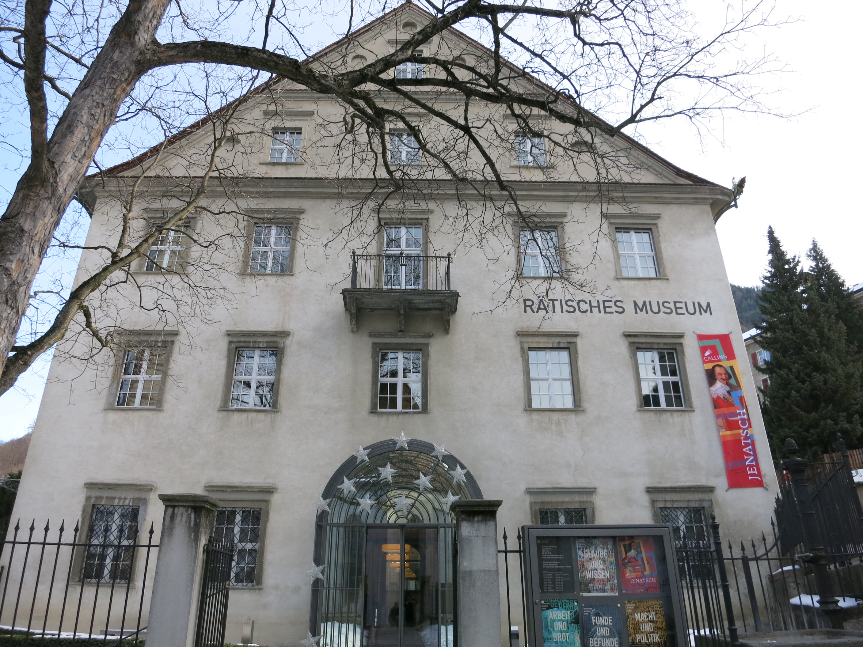 Historisches Gebäude, Stadt Chur GR, Schweiz